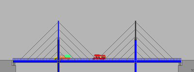 Schrägseilbrücke Harfenförmig